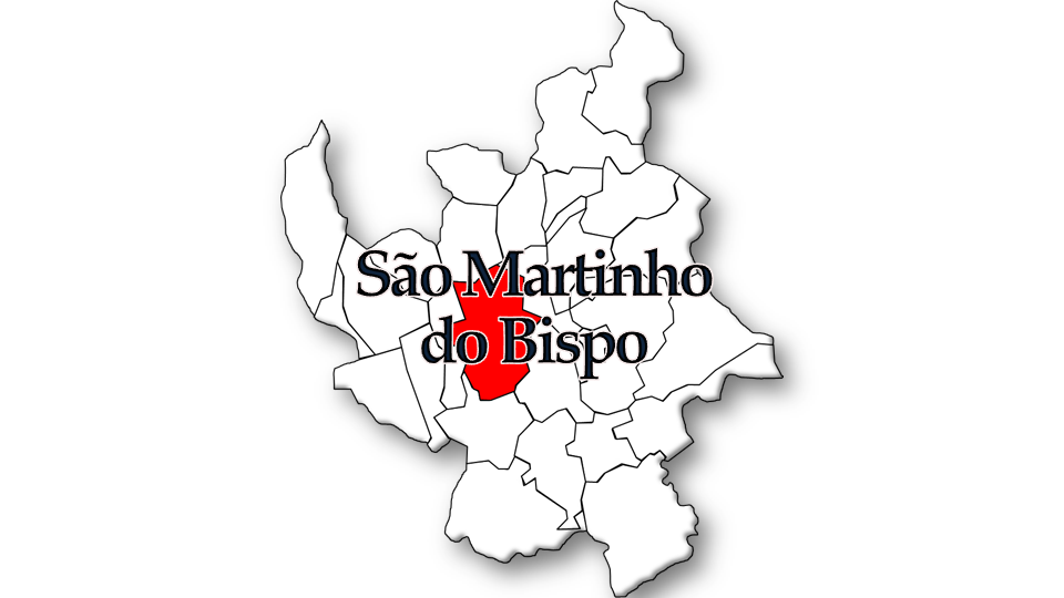 População